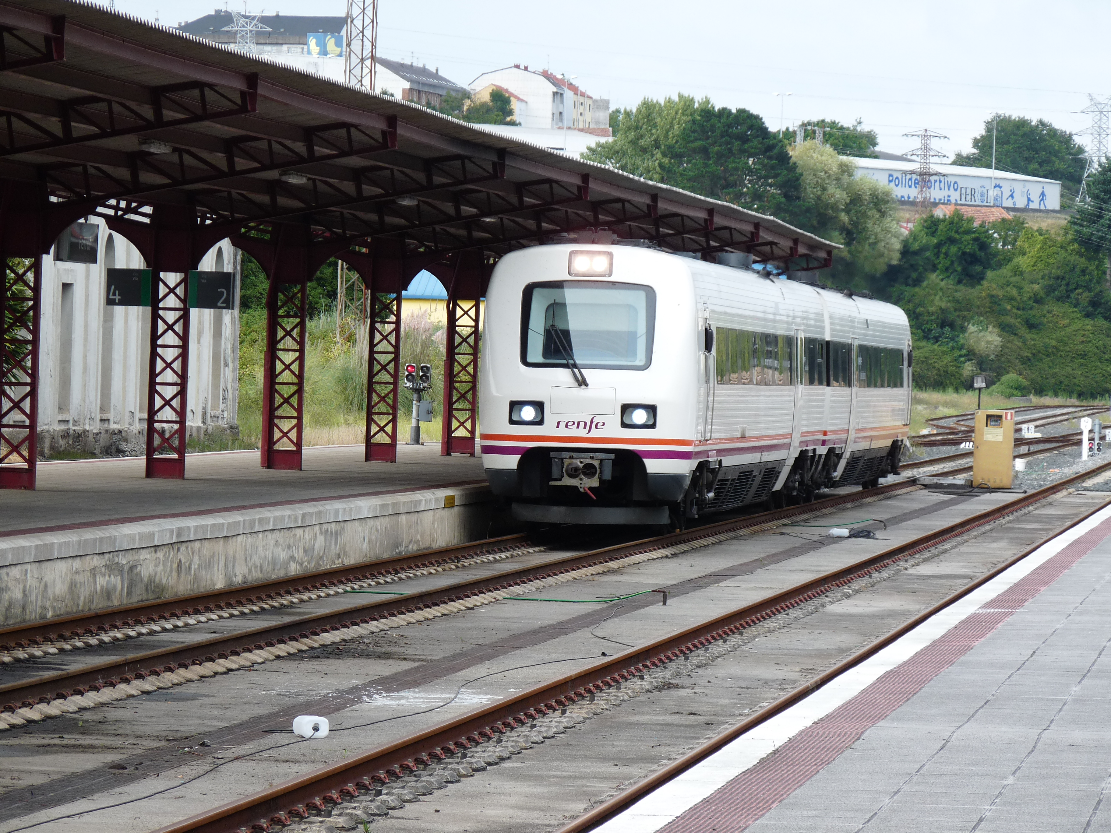 Binnenkomst van een gerenoveerde Deense treinstel type 594